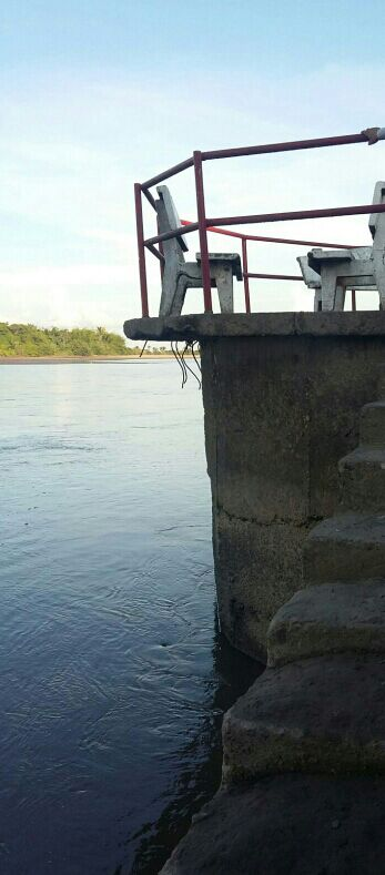 muelle